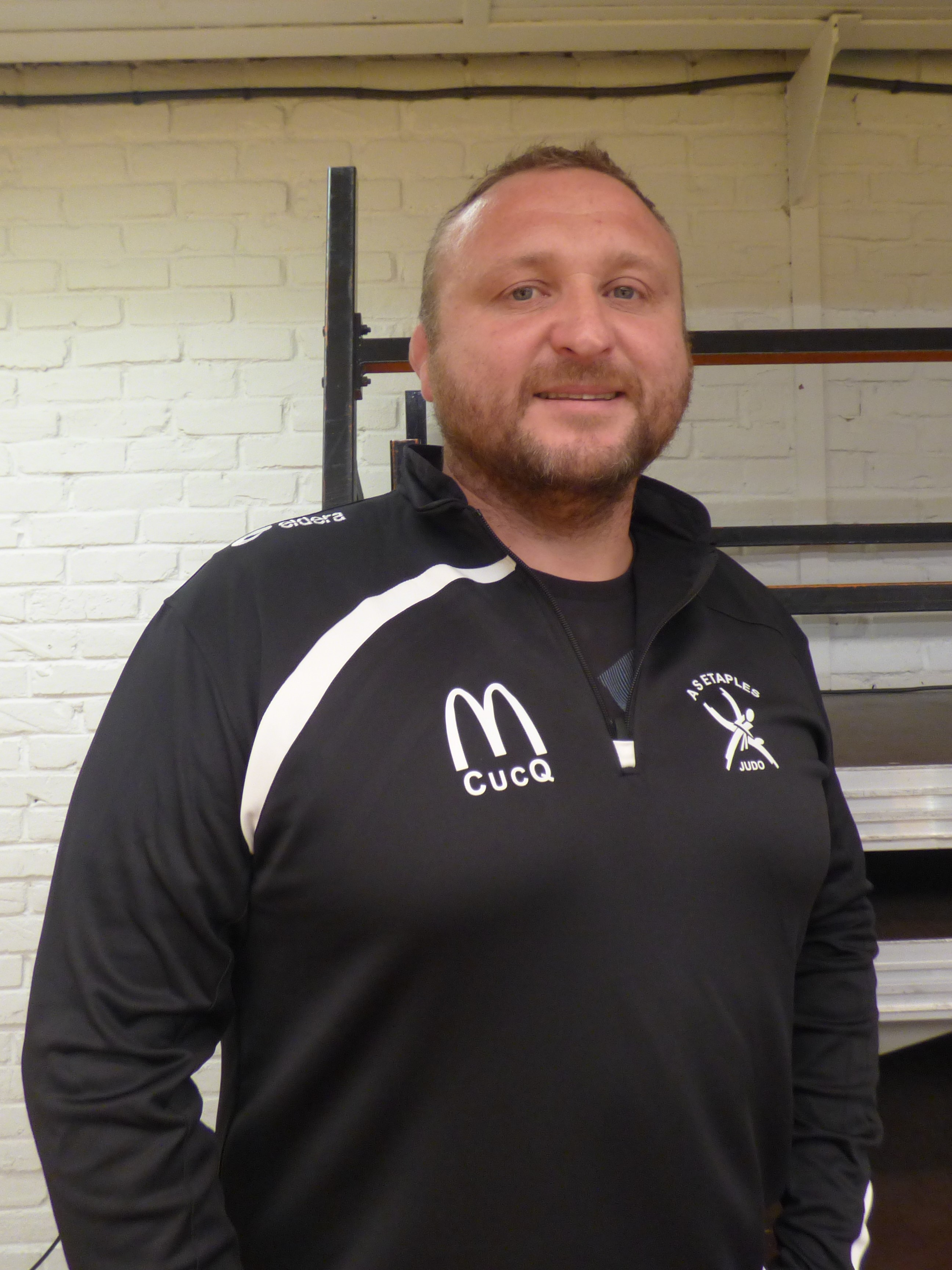 Matthieu Bataille lors d'une compétition régionale de judo à Billy-Montigny, le 15 juin 2019.